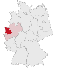 Regierungsbezirk Düsseldorf, North Rhine-Westphalia, Germany